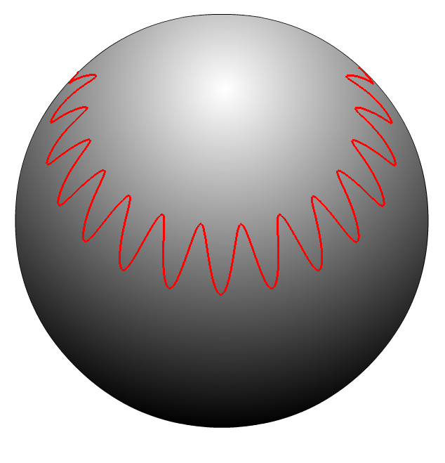 Движение апекса по сфере